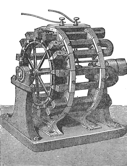 Fig. 198 Auguste de Méritens' magneto generator for lighthouses.